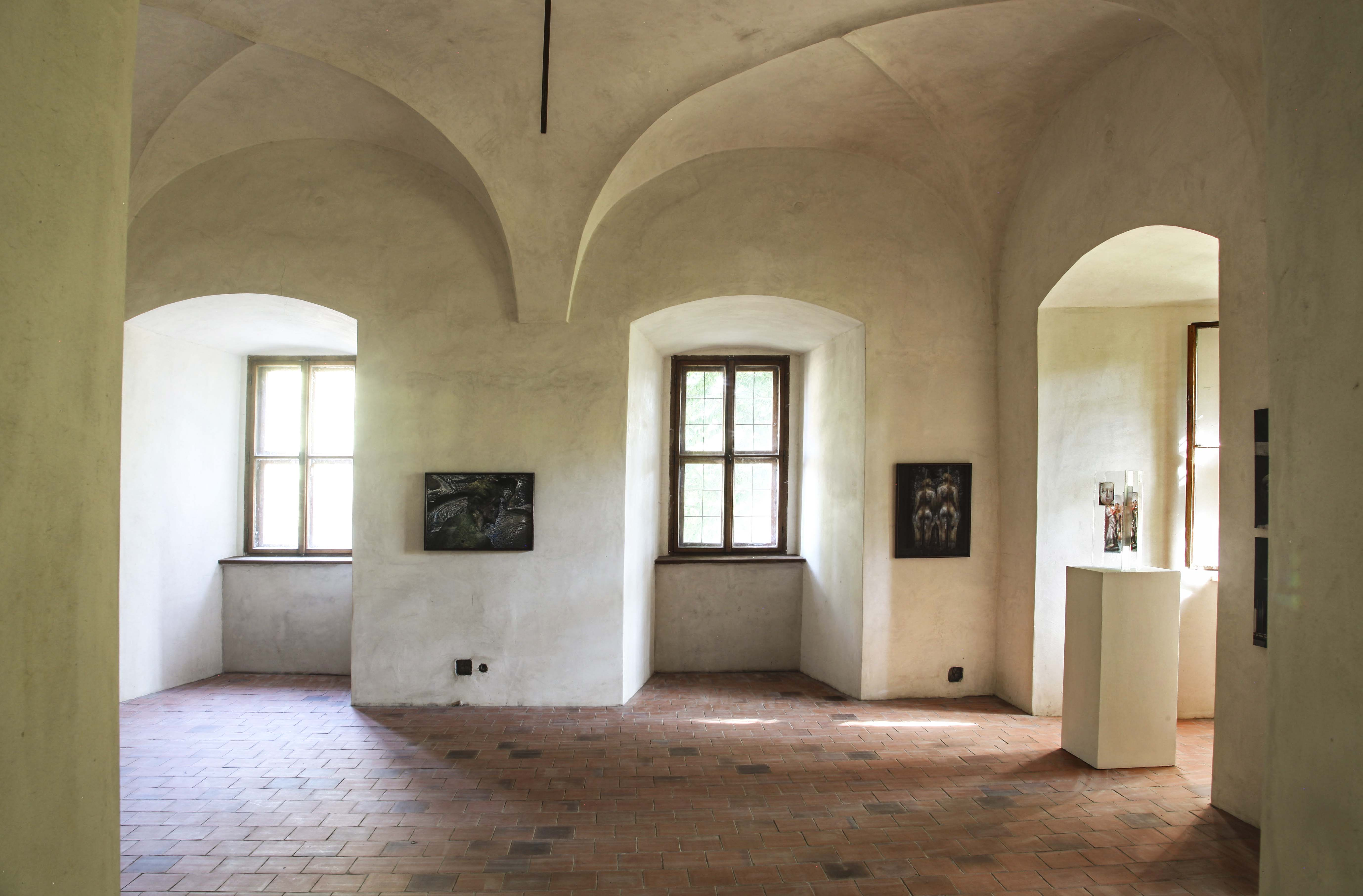 Gryspekovský palác interiér, 2019